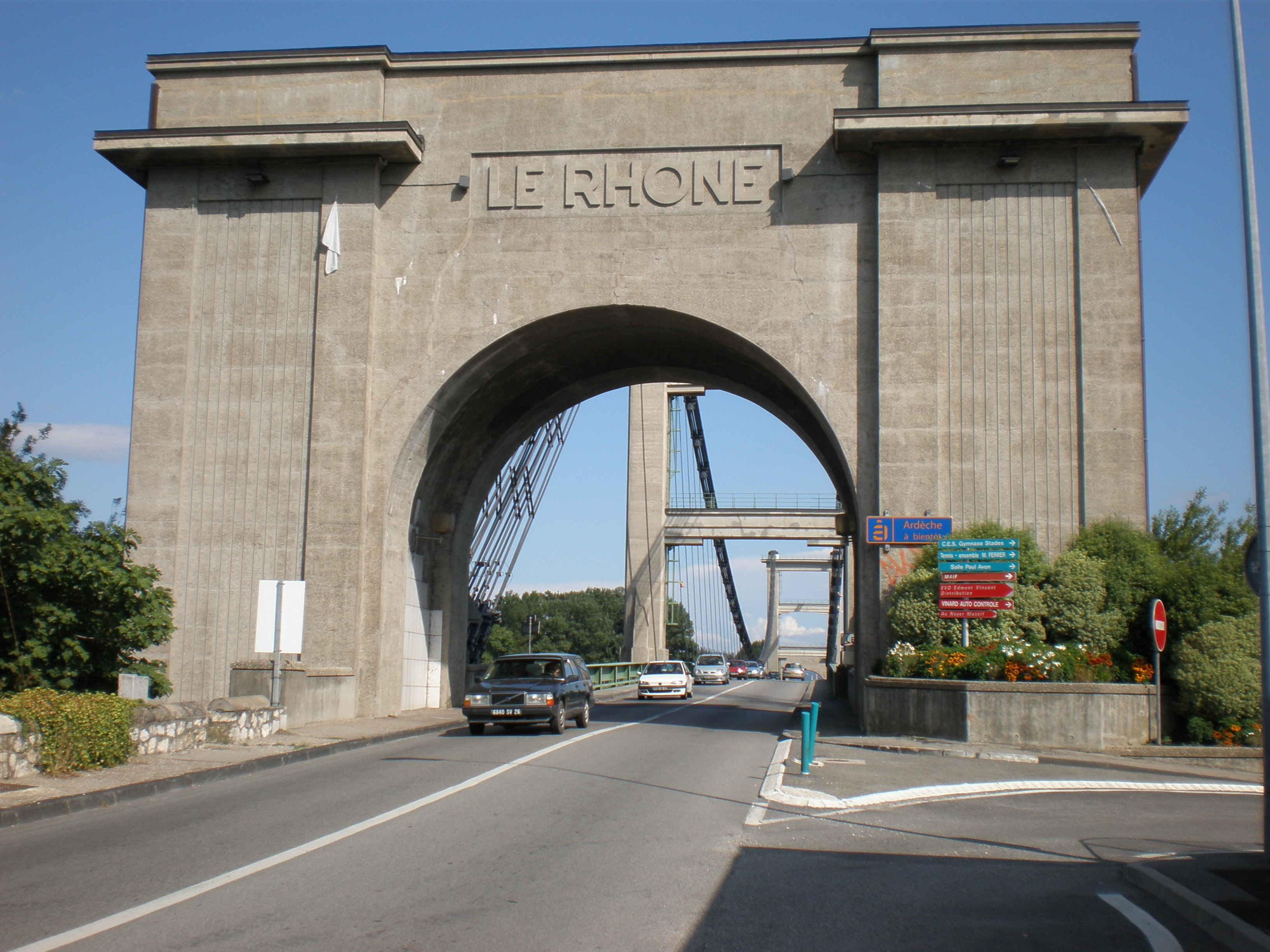 Entrée du pont sur le Rhône au Teil (Ardèche)